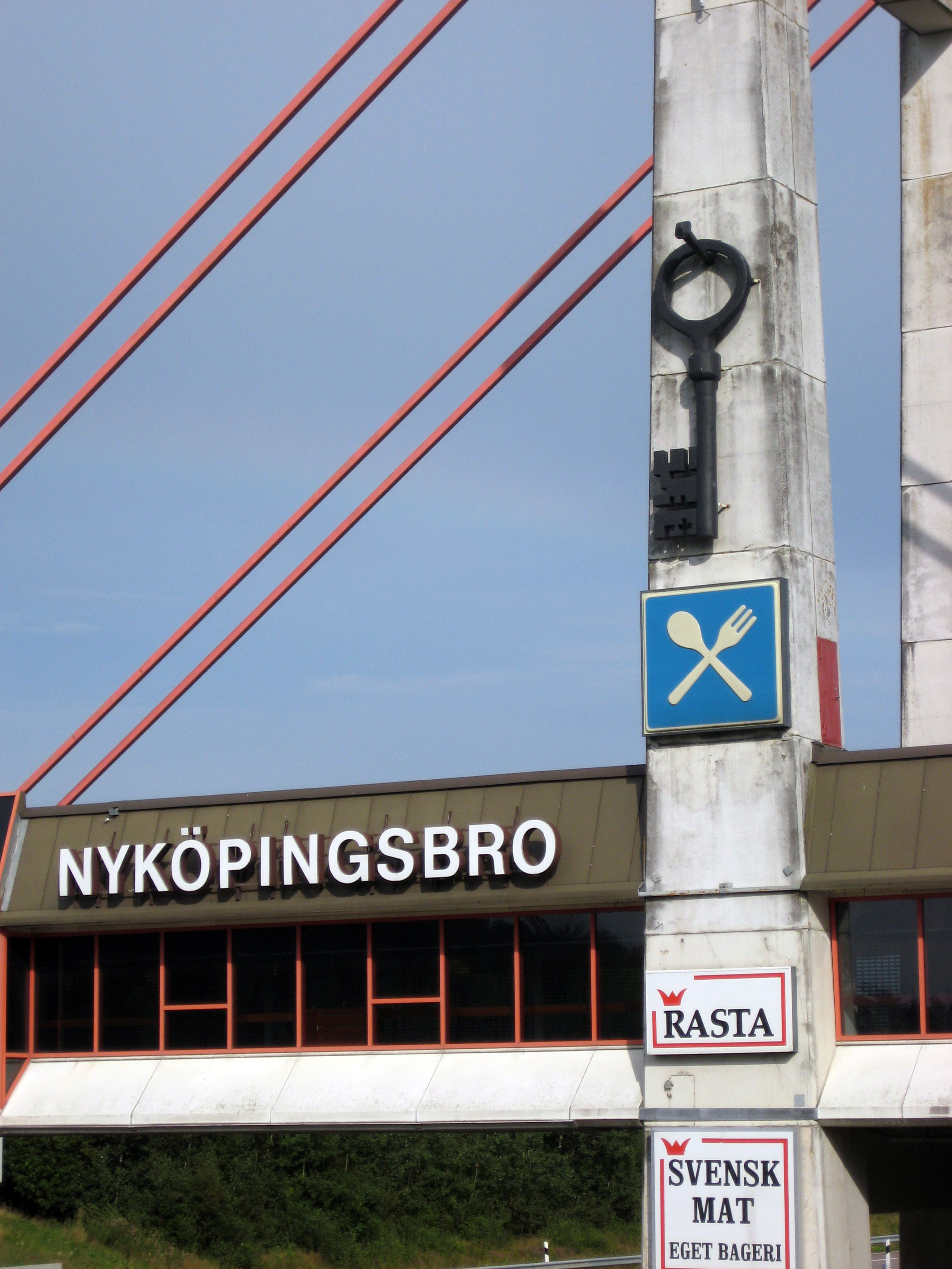 Nyköpingsbro är en rastplatsanläggning vid motorvägen på E4 sydväst om Nyköping.